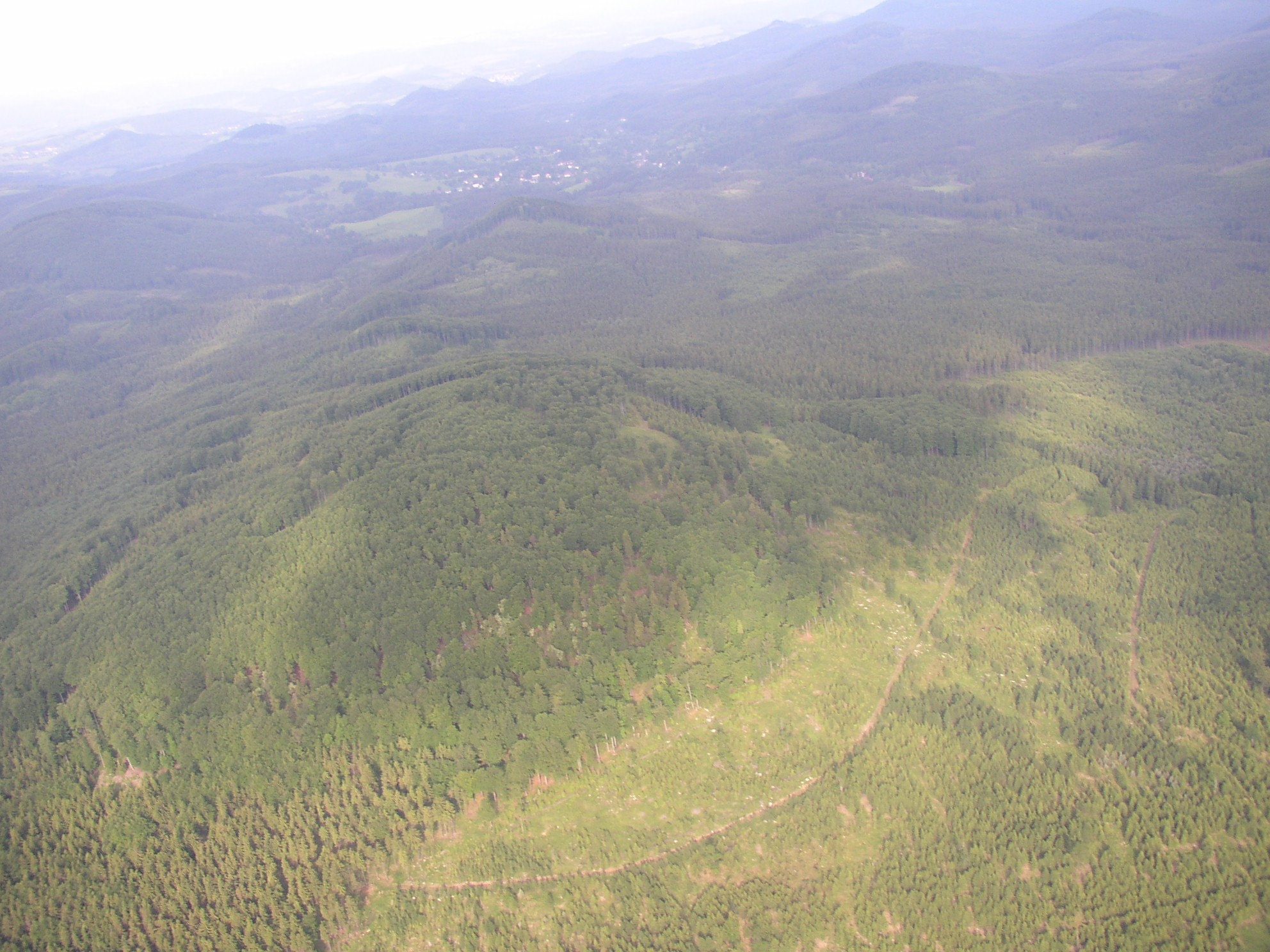 Velký Buk,Lužické hory, Czech republic